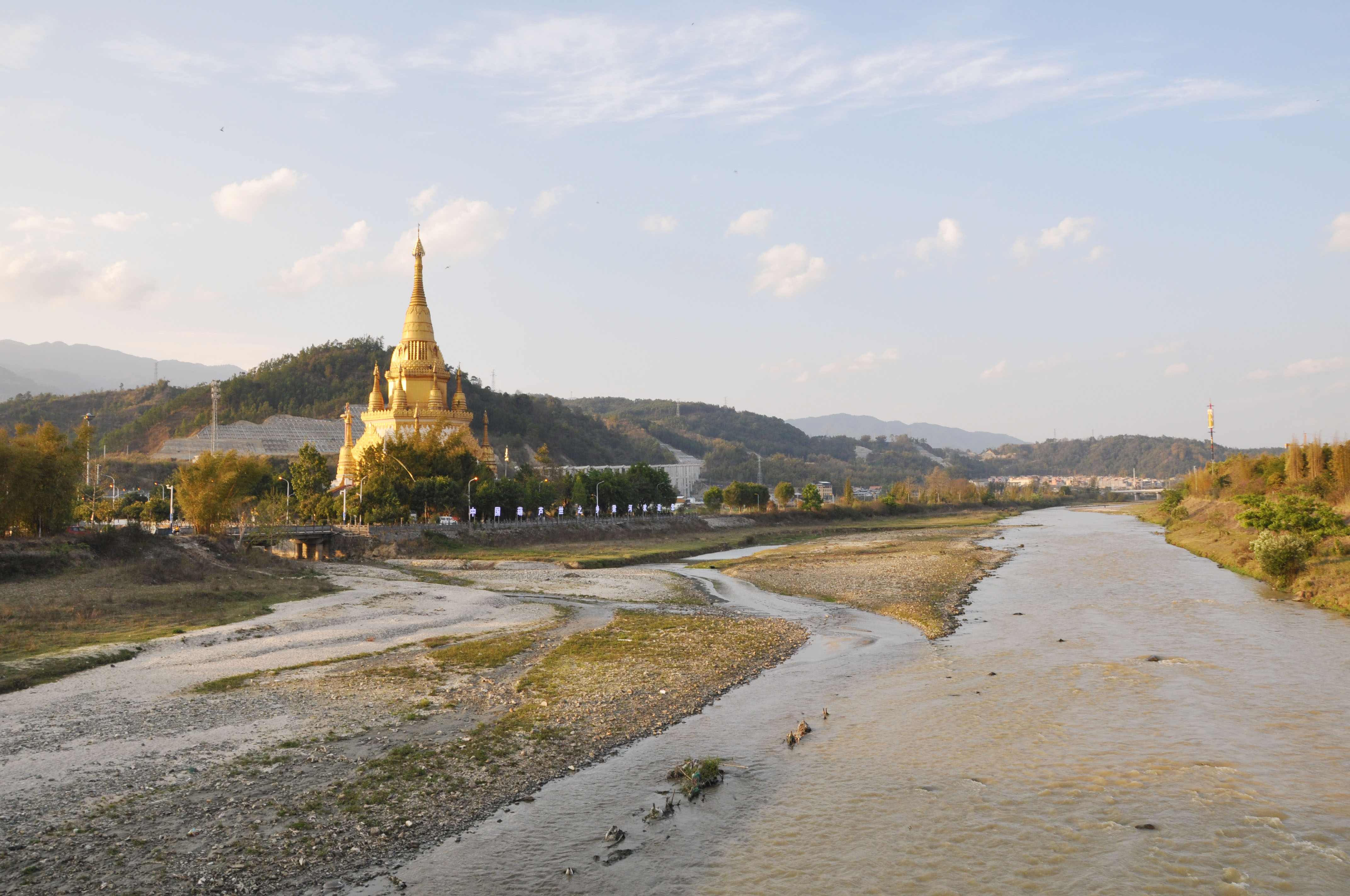 中国云南省德宏州梁河县城西郊的南底河和勐底金塔。